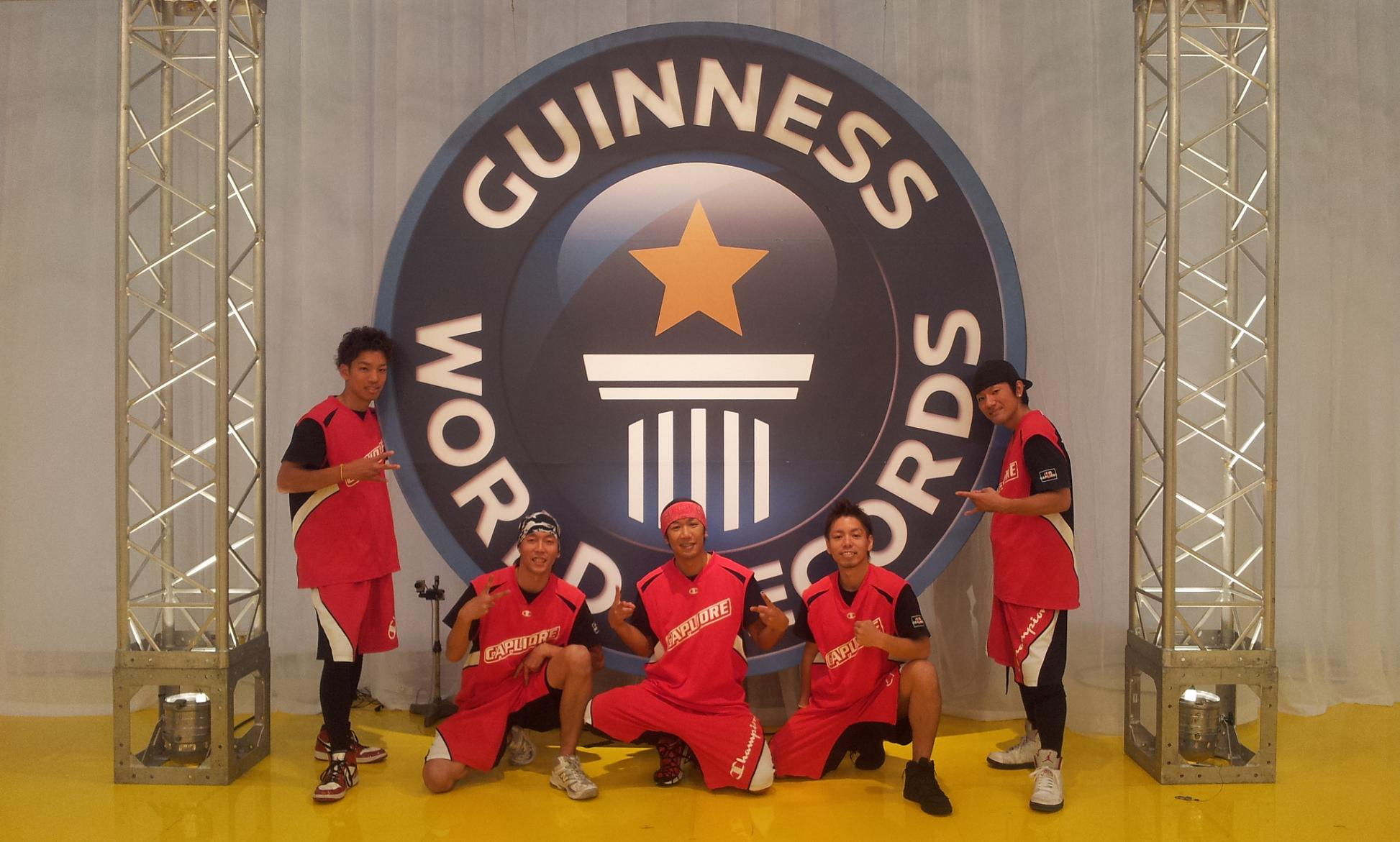 ギネスワールドレコードホルダーのCAPLIORE